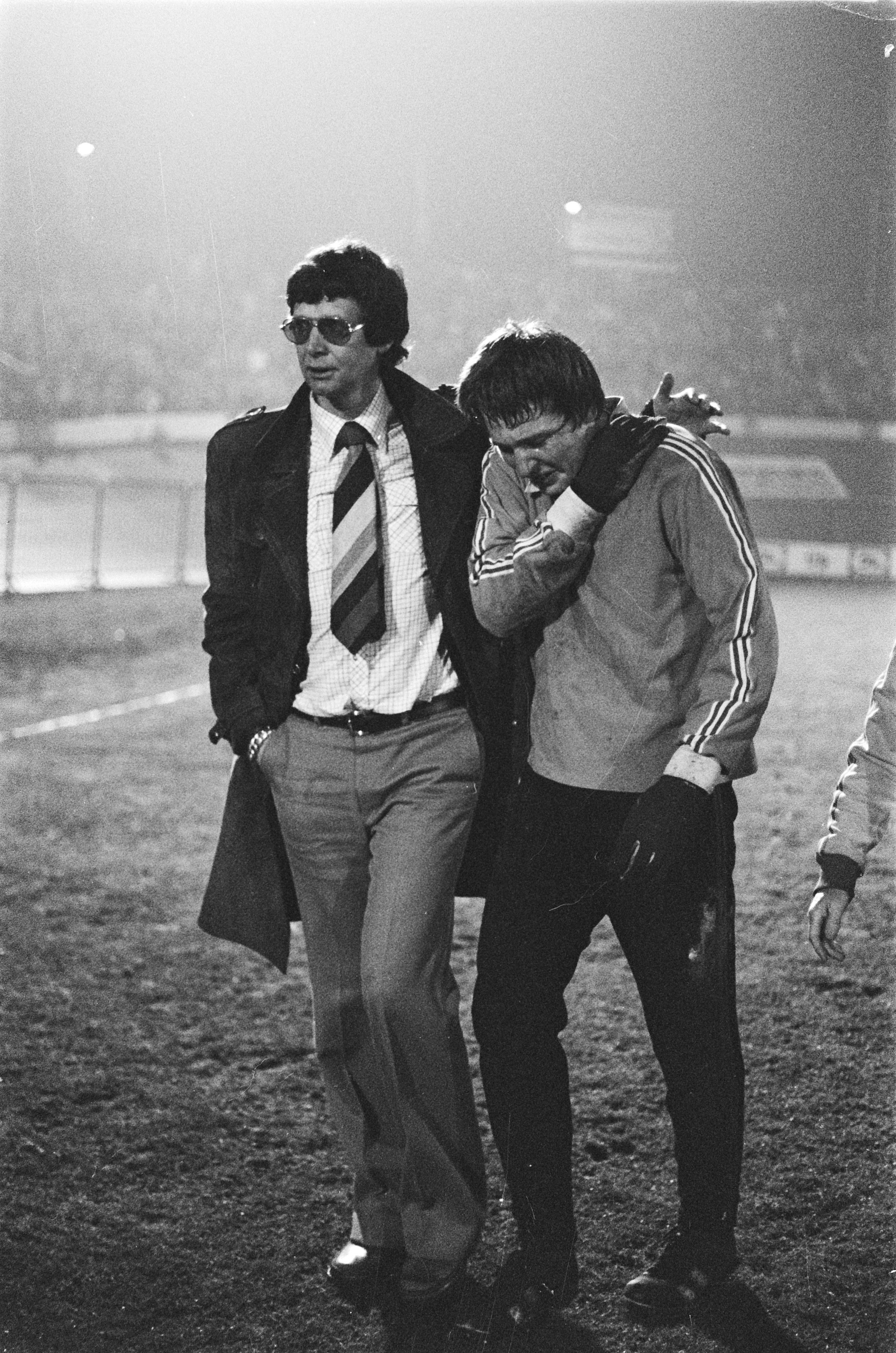 Collectie / Archief : Fotocollectie Anefo Reportage / Serie : [ onbekend ] Beschrijving : NEC tegen PSV 2-2; NEC-keeper Formannoy geblesseerd. Naast hem trainer Hans Croon Datum : 11 maart 1978 Locatie : Nijmegen Trefwoorden : blessures, sport, voetbal Persoonsnaam : Croon Hans, Formannoy Jan Fotograaf : Peters, Hans / Anefo Auteursrechthebbende : Nationaal Archief Materiaalsoort : Negatief (zwart/wit) Nummer archiefinventaris : bekijk toegang 2.24.01.05 Bestanddeelnummer : 929-6176